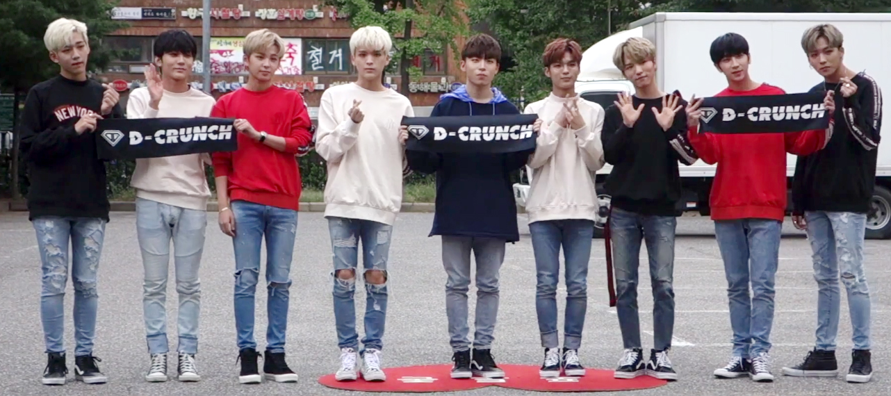 14일 오전 서울시 영등포구 여의도 KBS ‘뮤직뱅크’ 리허설을 위해 가수들이 이른 새벽 출근을 하고 있다. 디크런치가 활기찬 아침인사를 하고 있다.